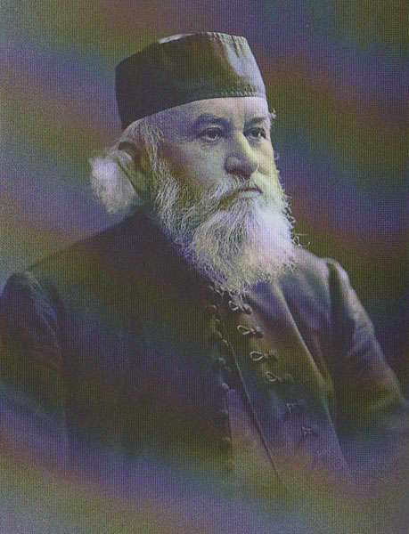 Димитрије Руварац, историчар (1842-1931)